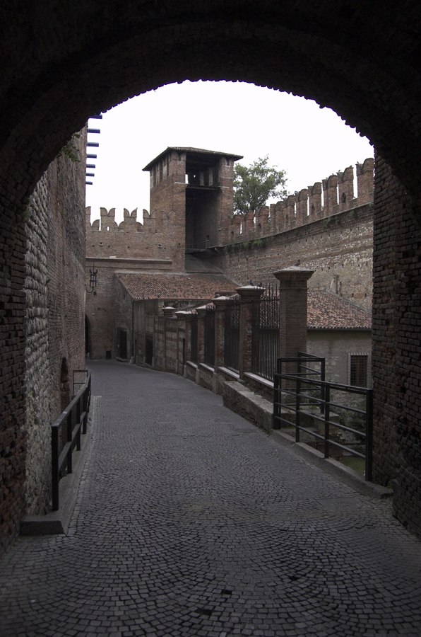 Castello scaligero di Verona